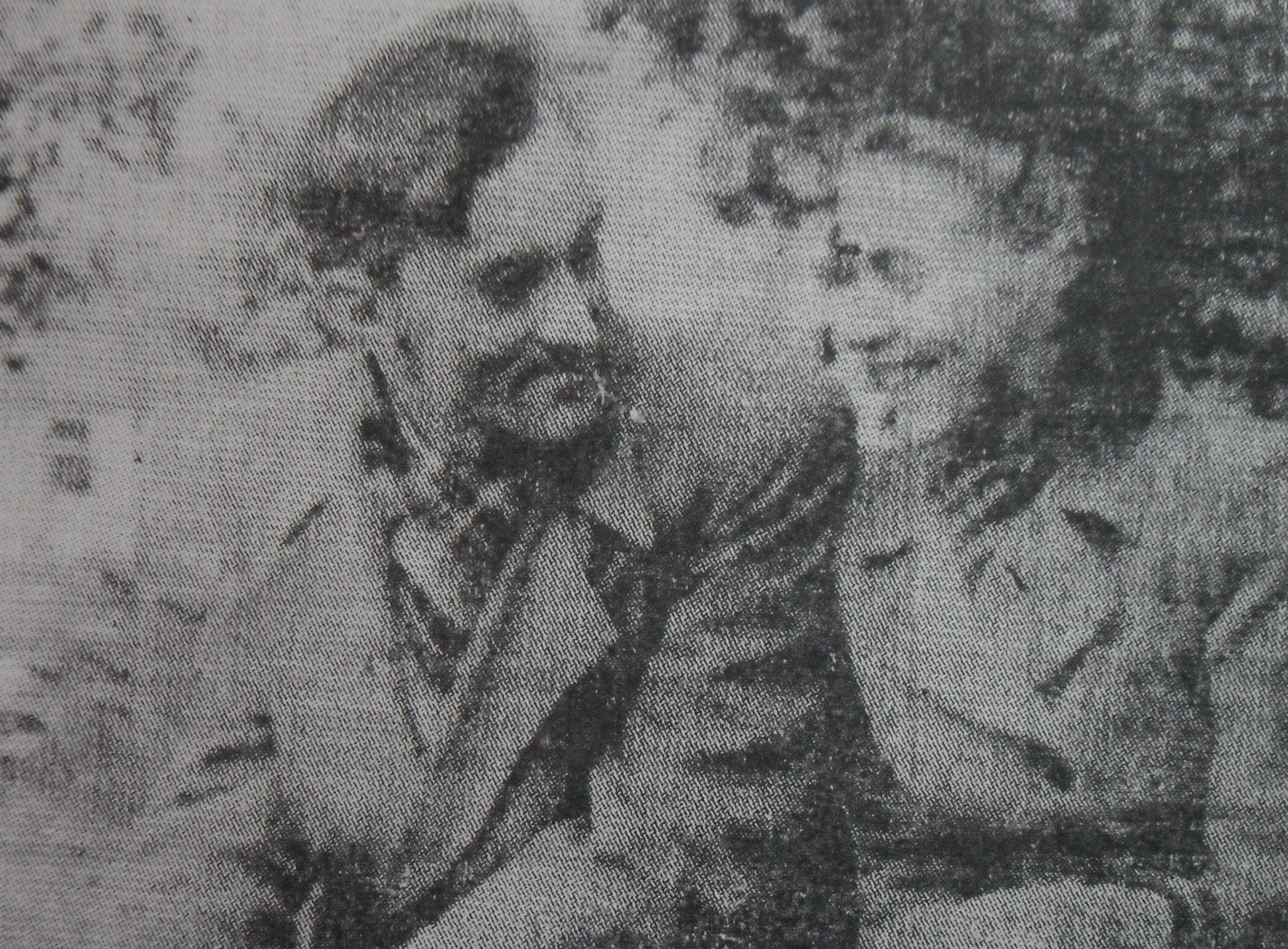 Srpskohrvatski / српскохрватски: Jugoslovenski revolucionar Dragan Ozren i njegova žena Ida Litvakova u Moskvi krajem tridesetih.